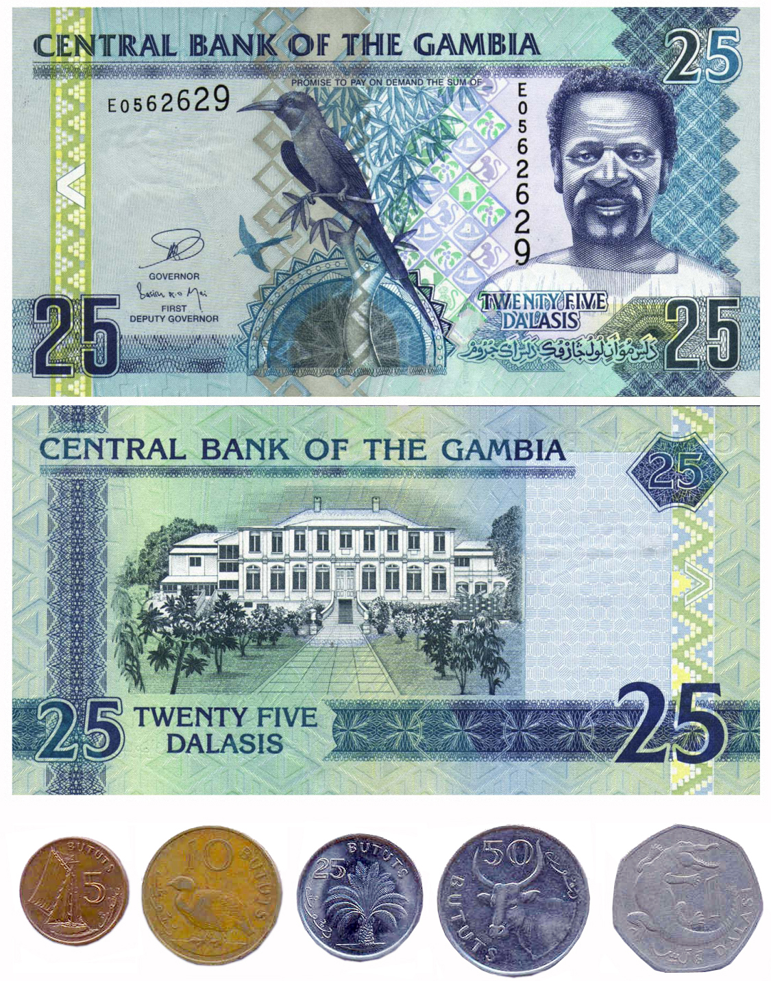 Exemple de bitllet de 25 dalasi per davant i darrera, i monedes de dalasi i bututs (borr) (act) 12:59 23 abr, 2005 . . Jolle (396810 octets)